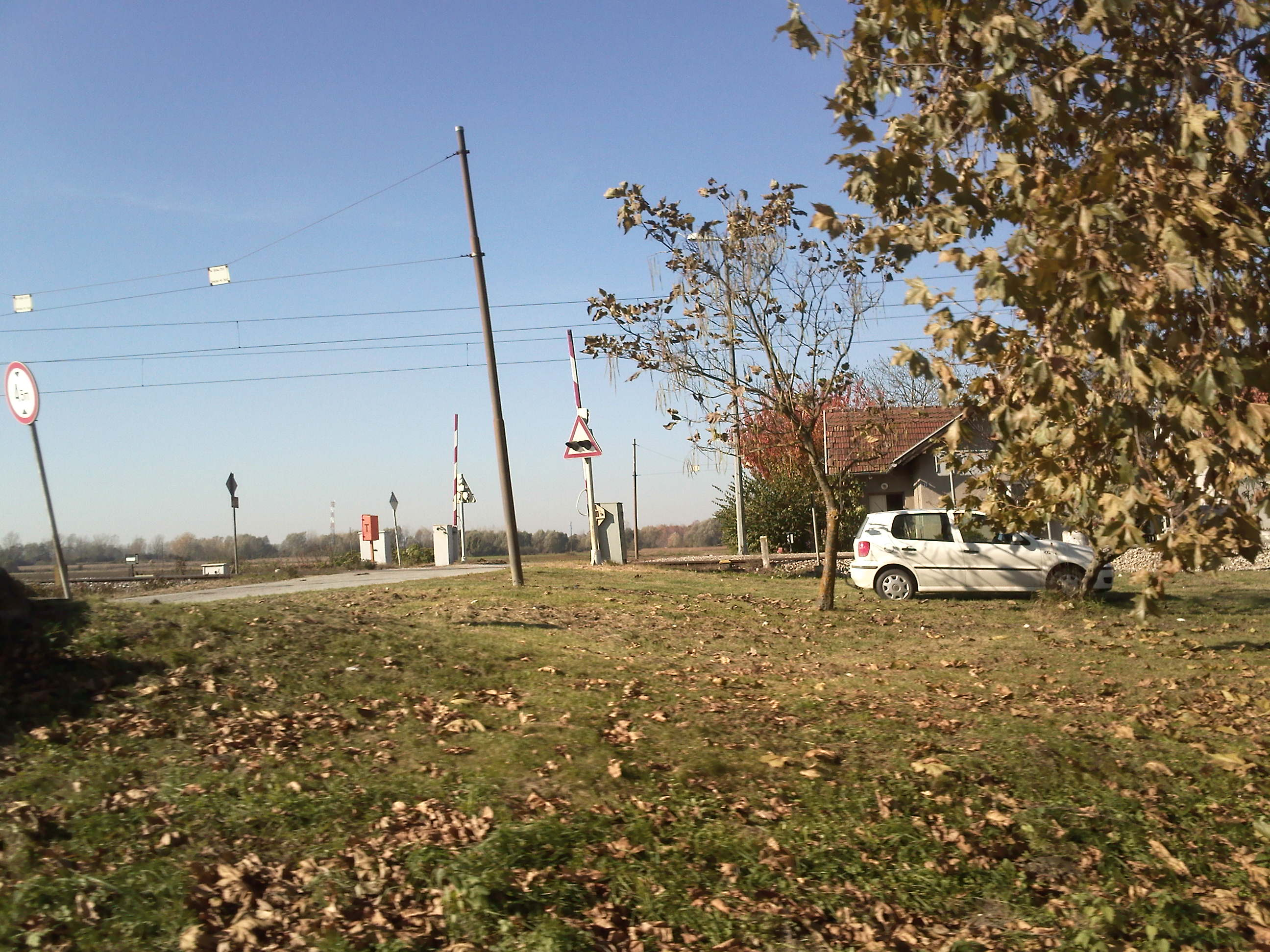 Jesen željeznička stanica Botovo